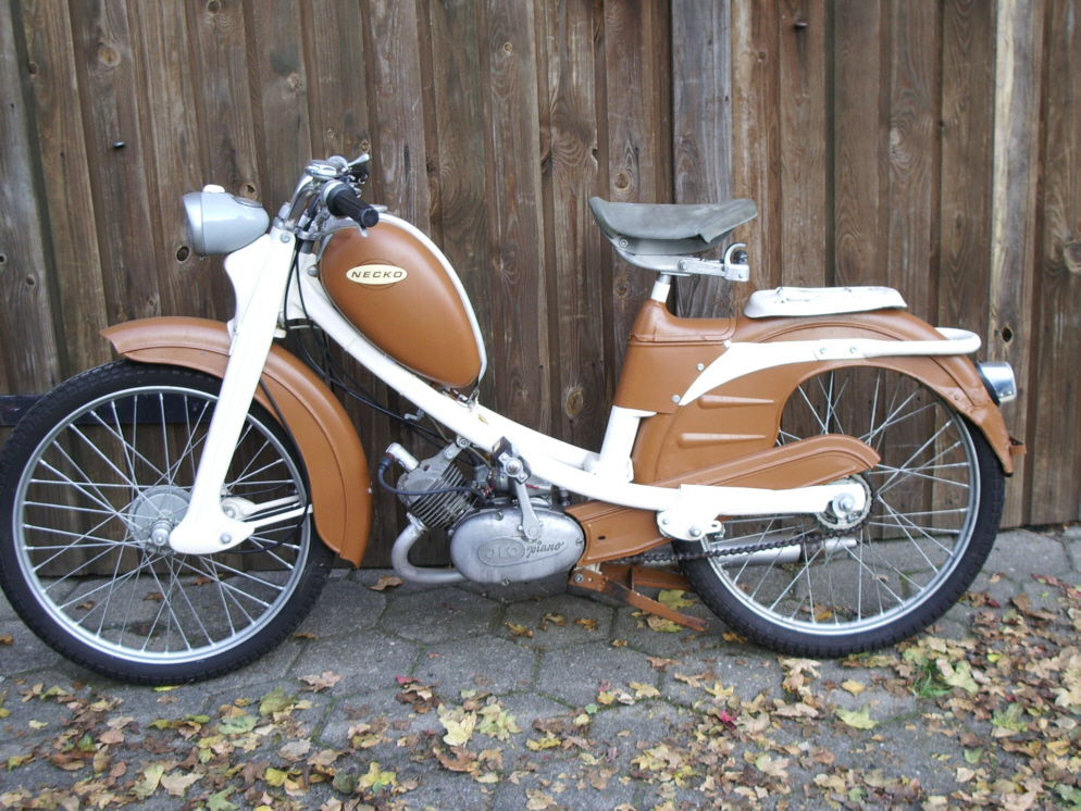 Moped der Firma Geier Motorradwerke mit ILO Piano Motor, Baujahr 1958, hergestellt für die Firma Neckermann